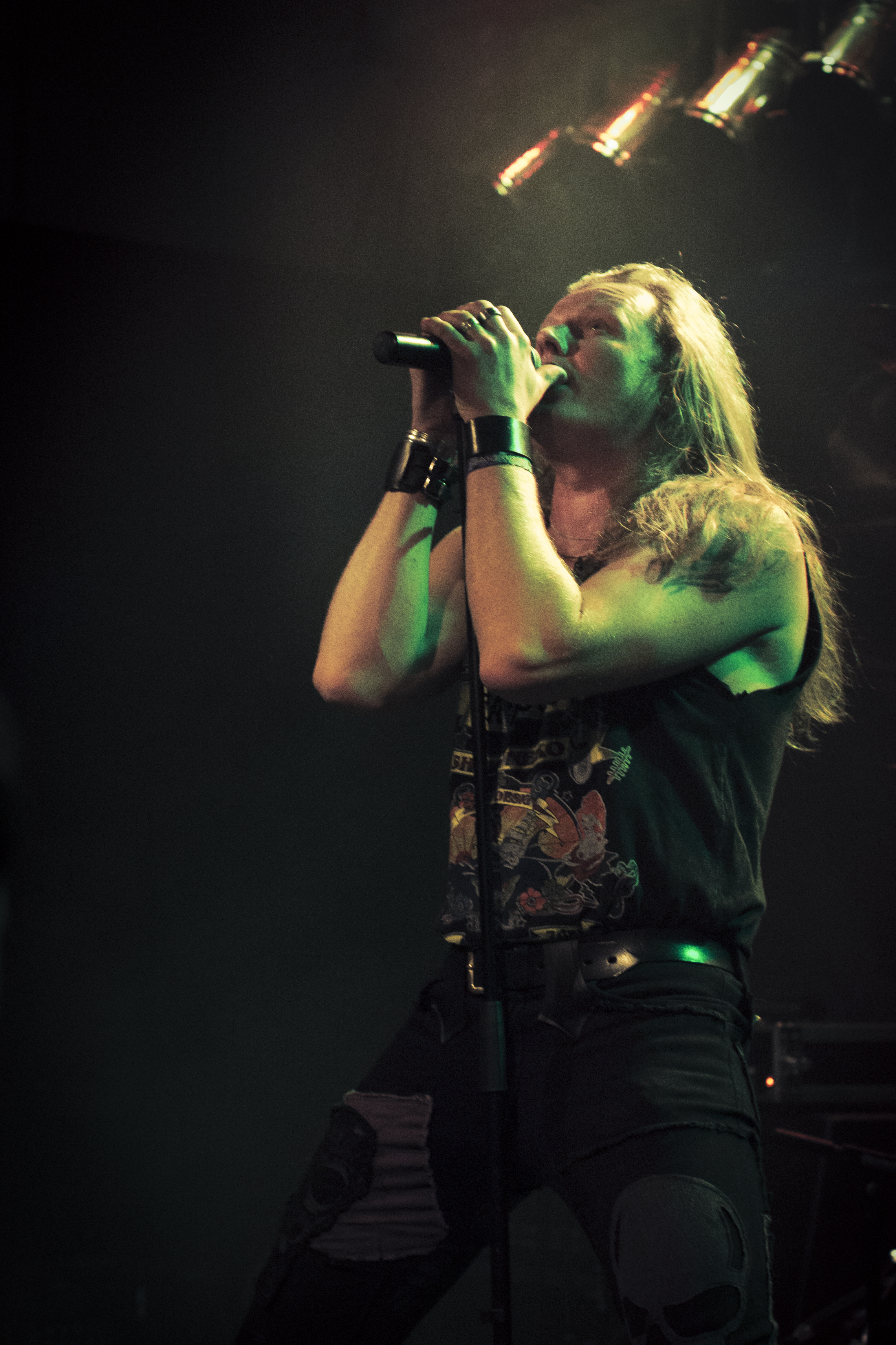 Herbie Langhans chanteur de Sinbreed au Blast of Eternity 2012.